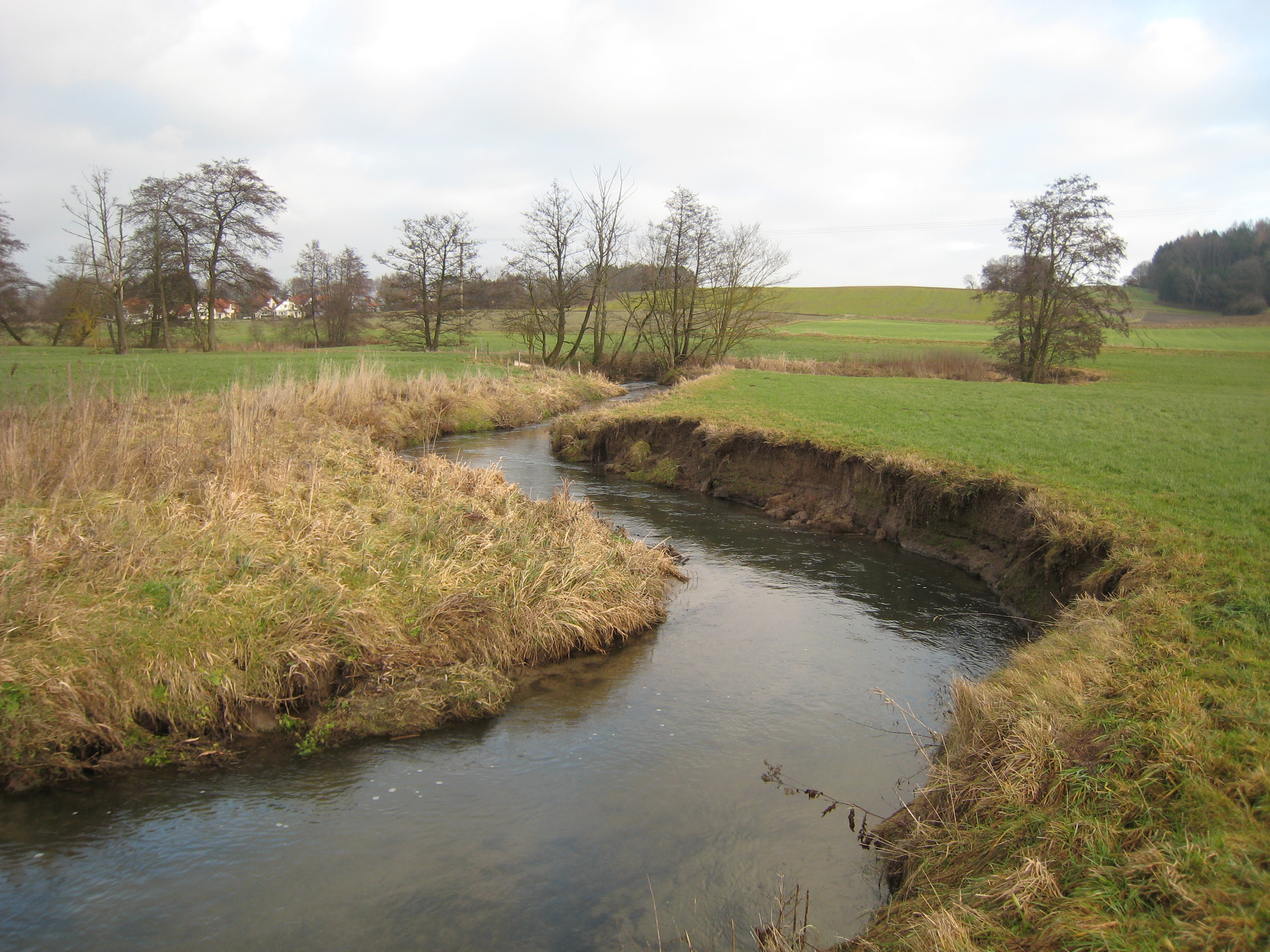 Die Weilach zwischen den Ortschaften Weilach und Schiltberg